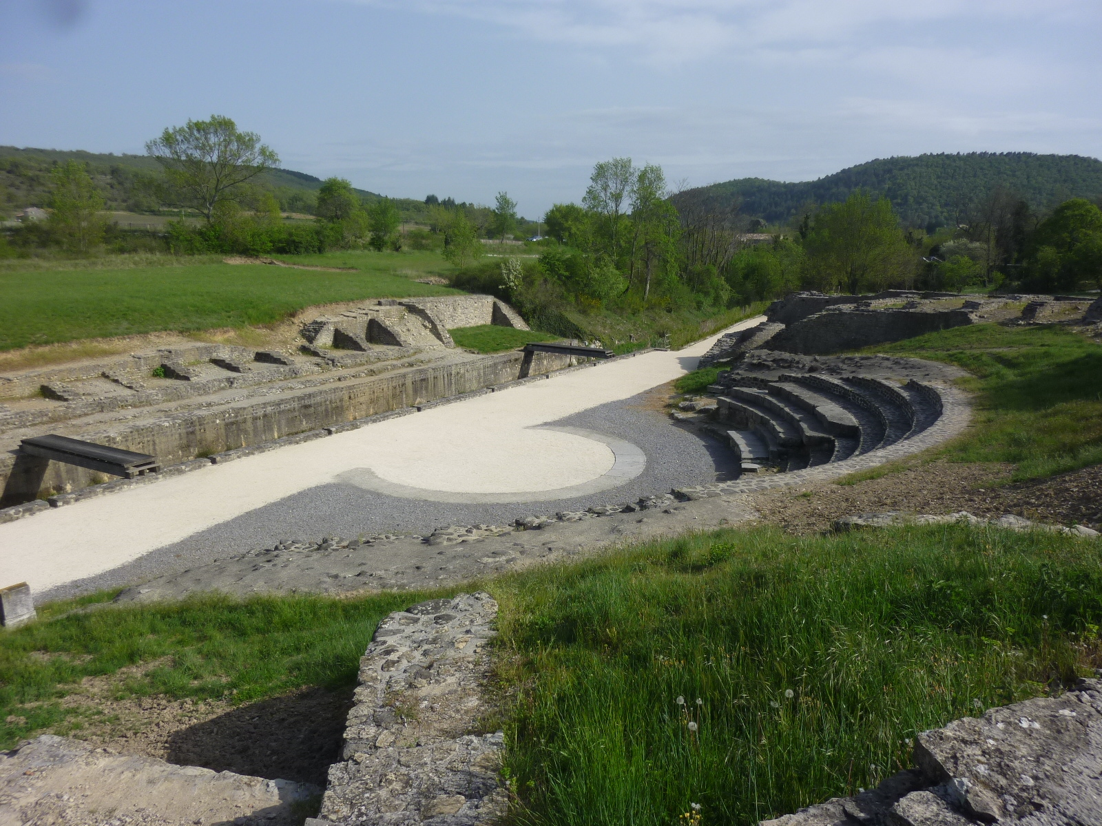 Théâtre, site archéologique romain d'Alba-la-Romaine, Ardèche, France